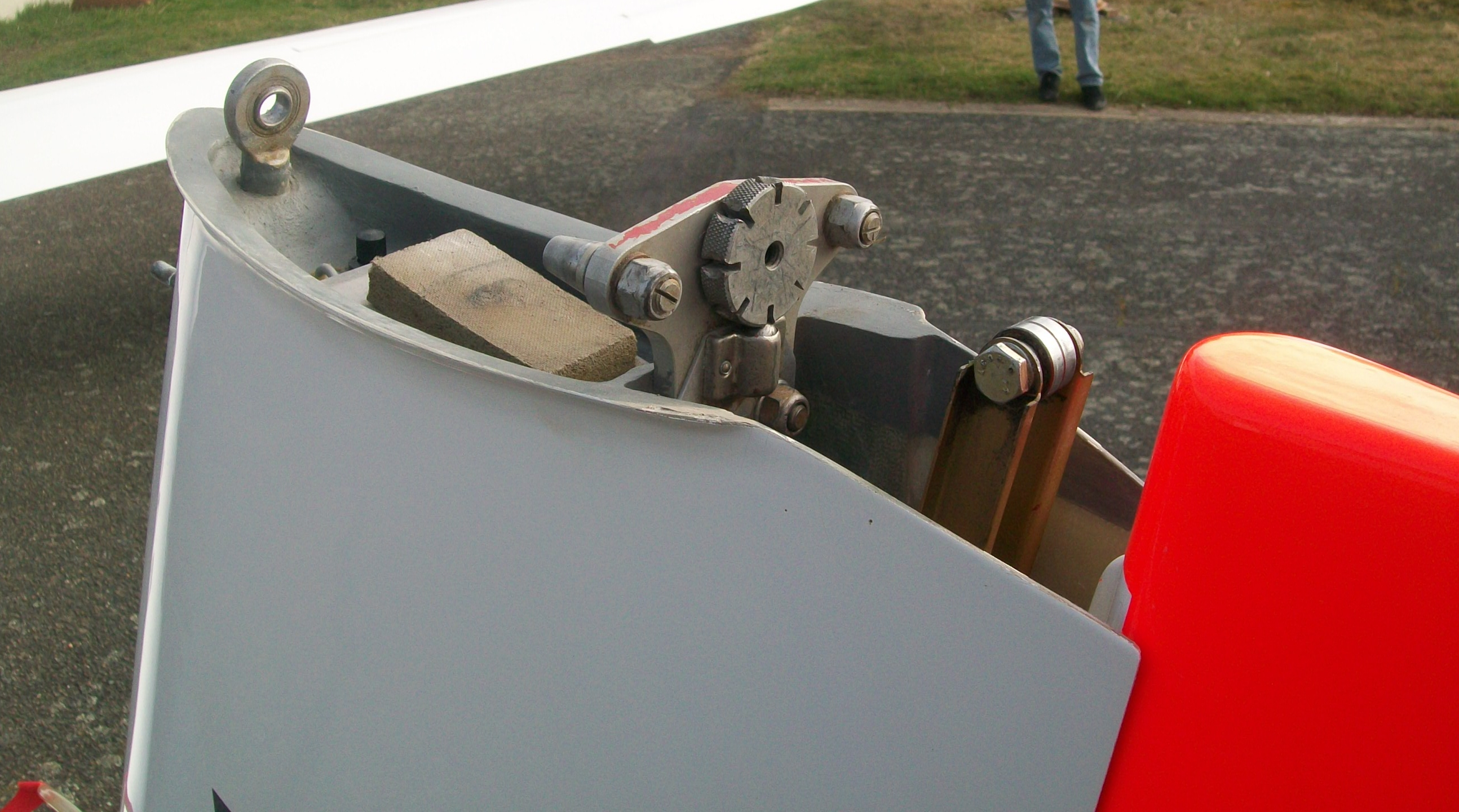 Gros plan sur la fixation de profondeur d'un LS-4